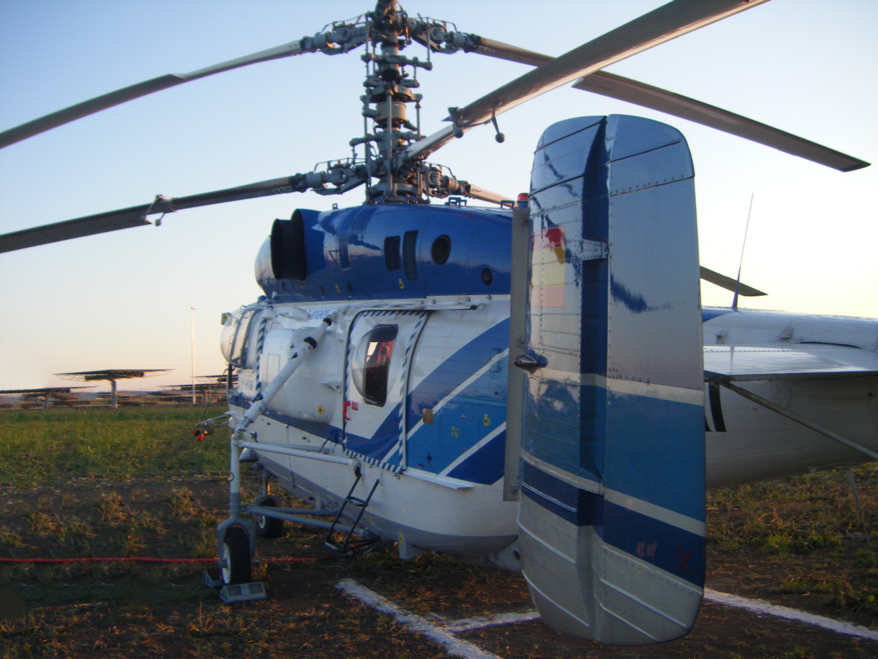 Kamov Ka-32 y heliostatos al fondo